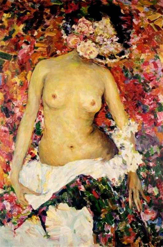 Натурщица в шляпе